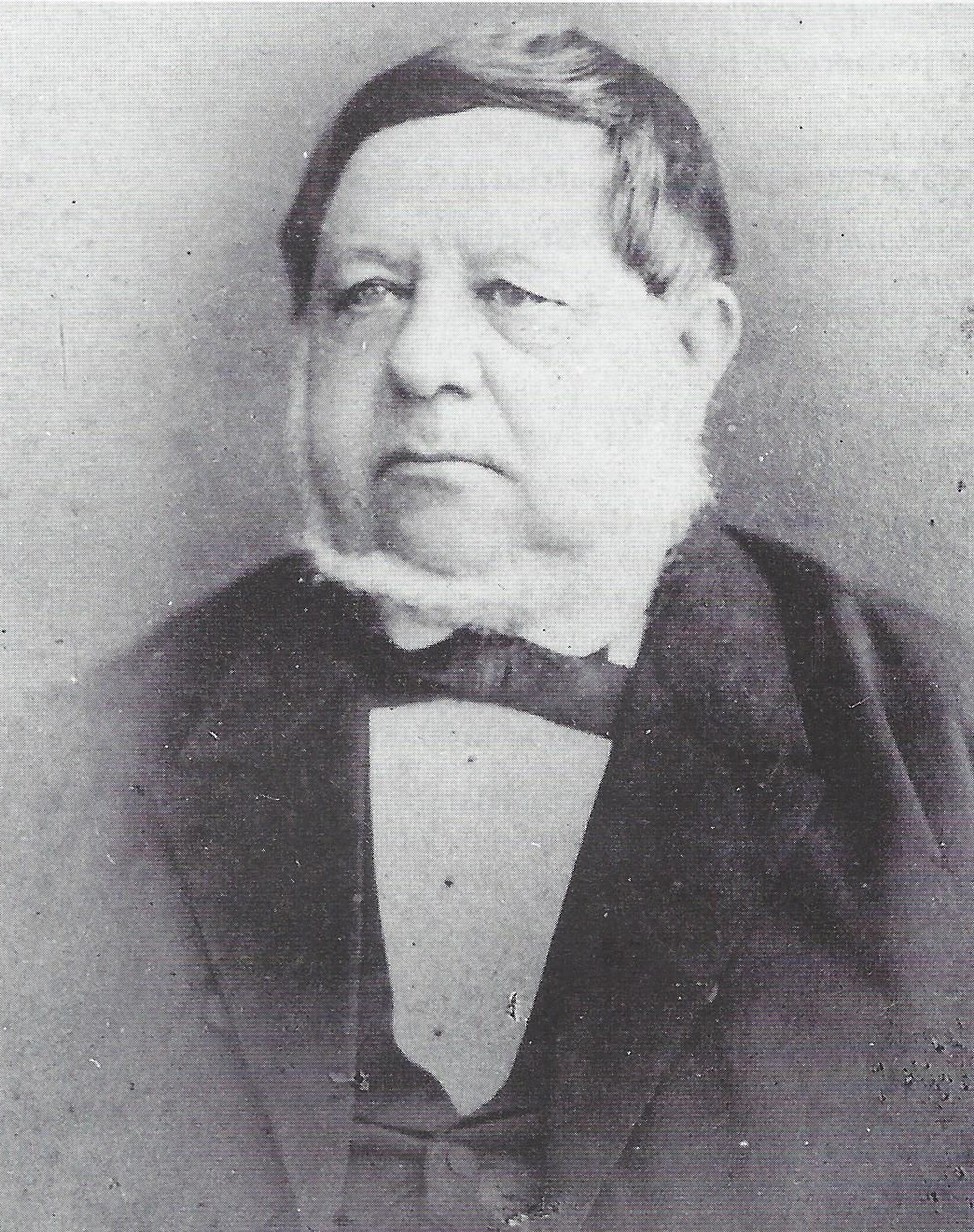 Porträtfotografie von Carl Ferdinand Eichstedt